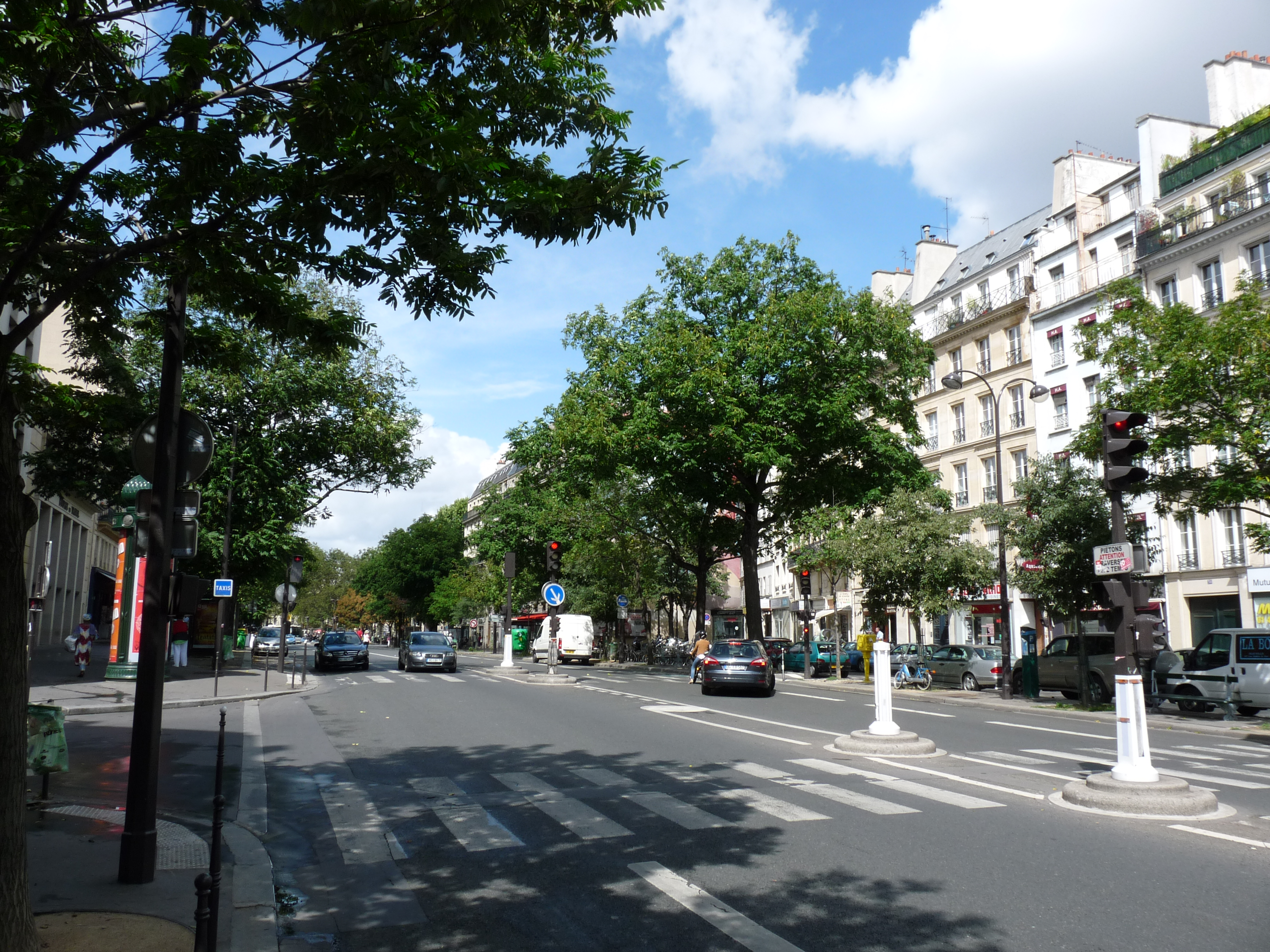 Le Boulevard du Temple a Paris, vue vers le nord